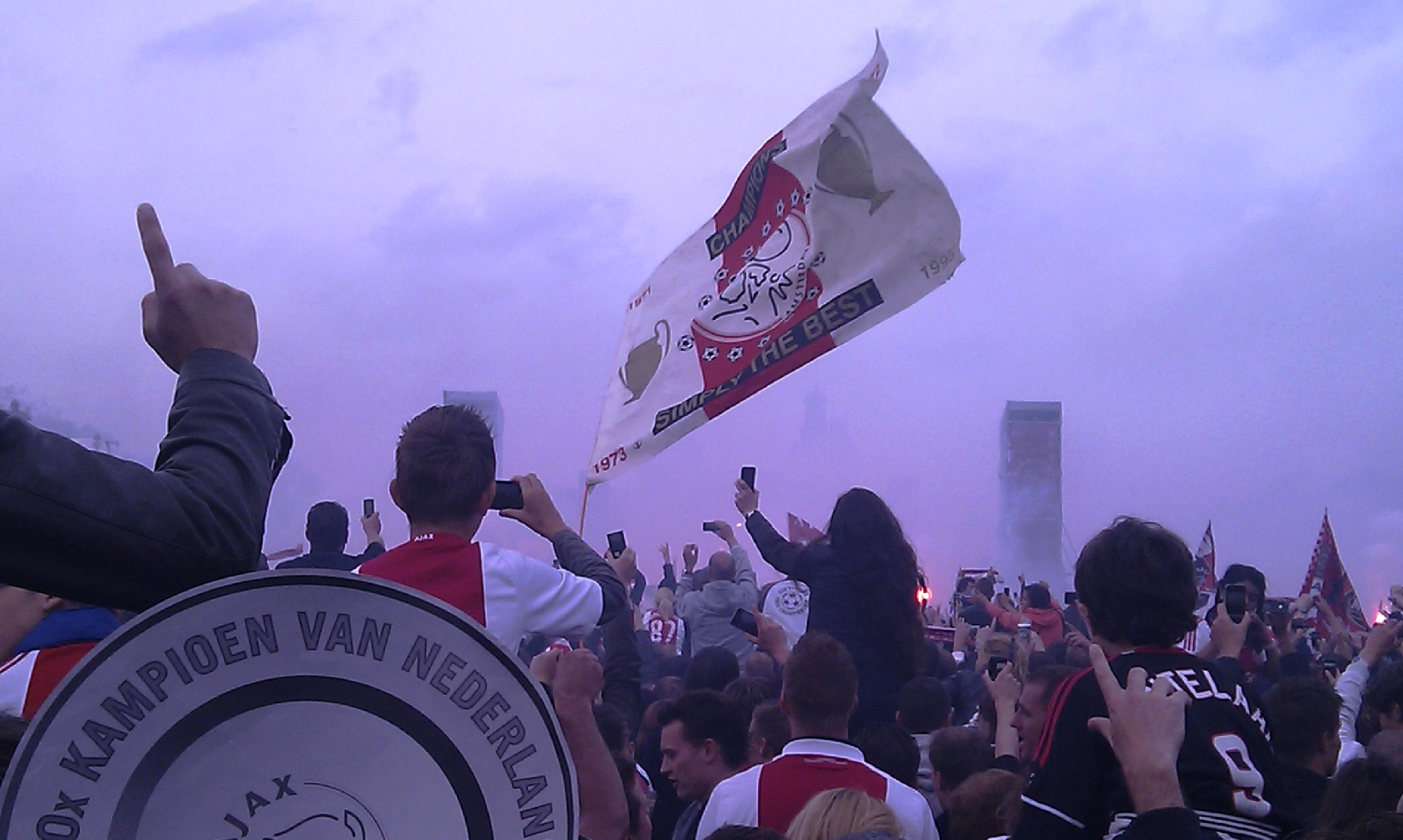 Kampioensfeest van AFC Ajax op 15 mei 2011.